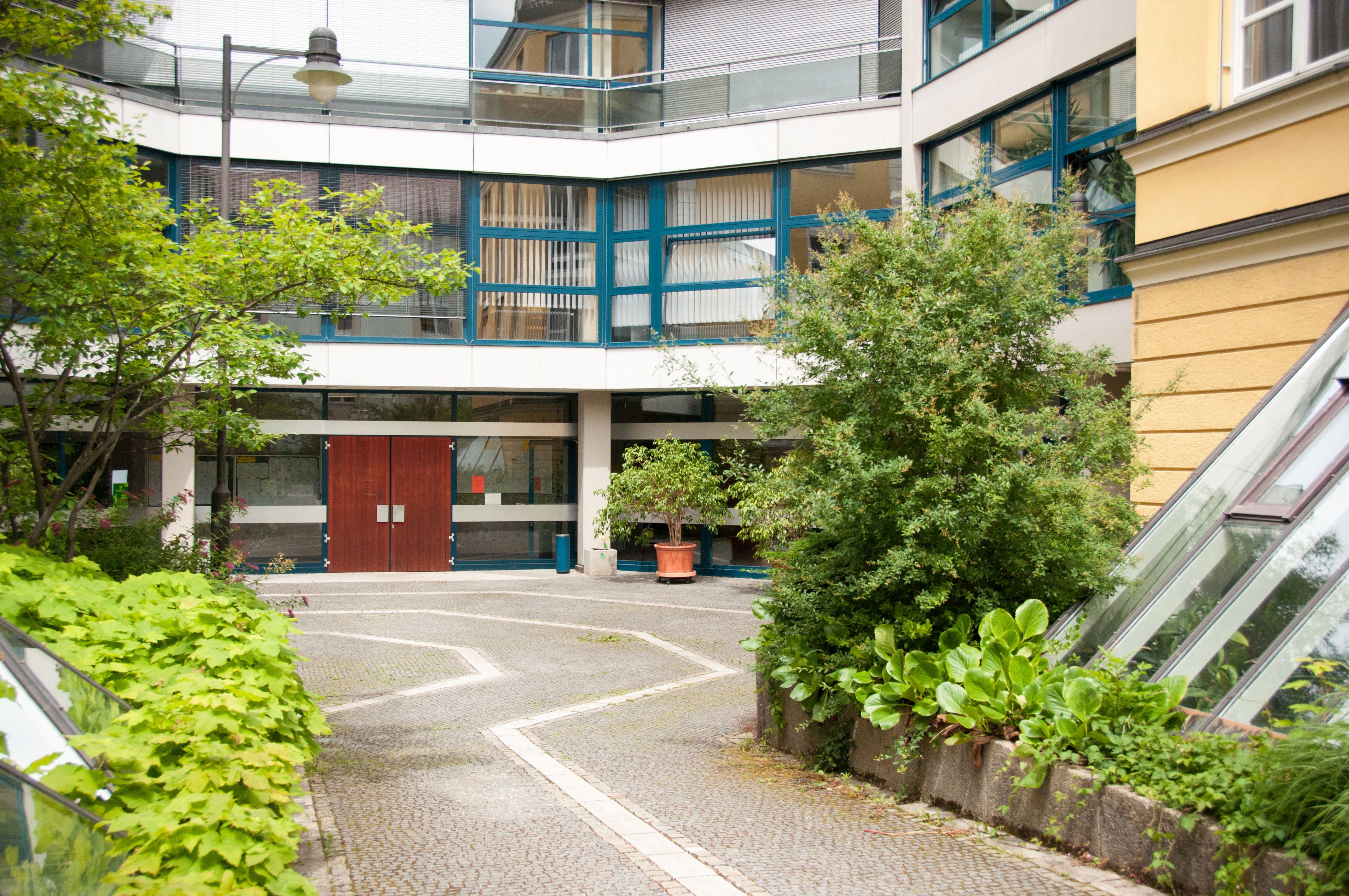 Innenhof der Hochschule für Philosophie München, Kaulbachstraße 31/33, München